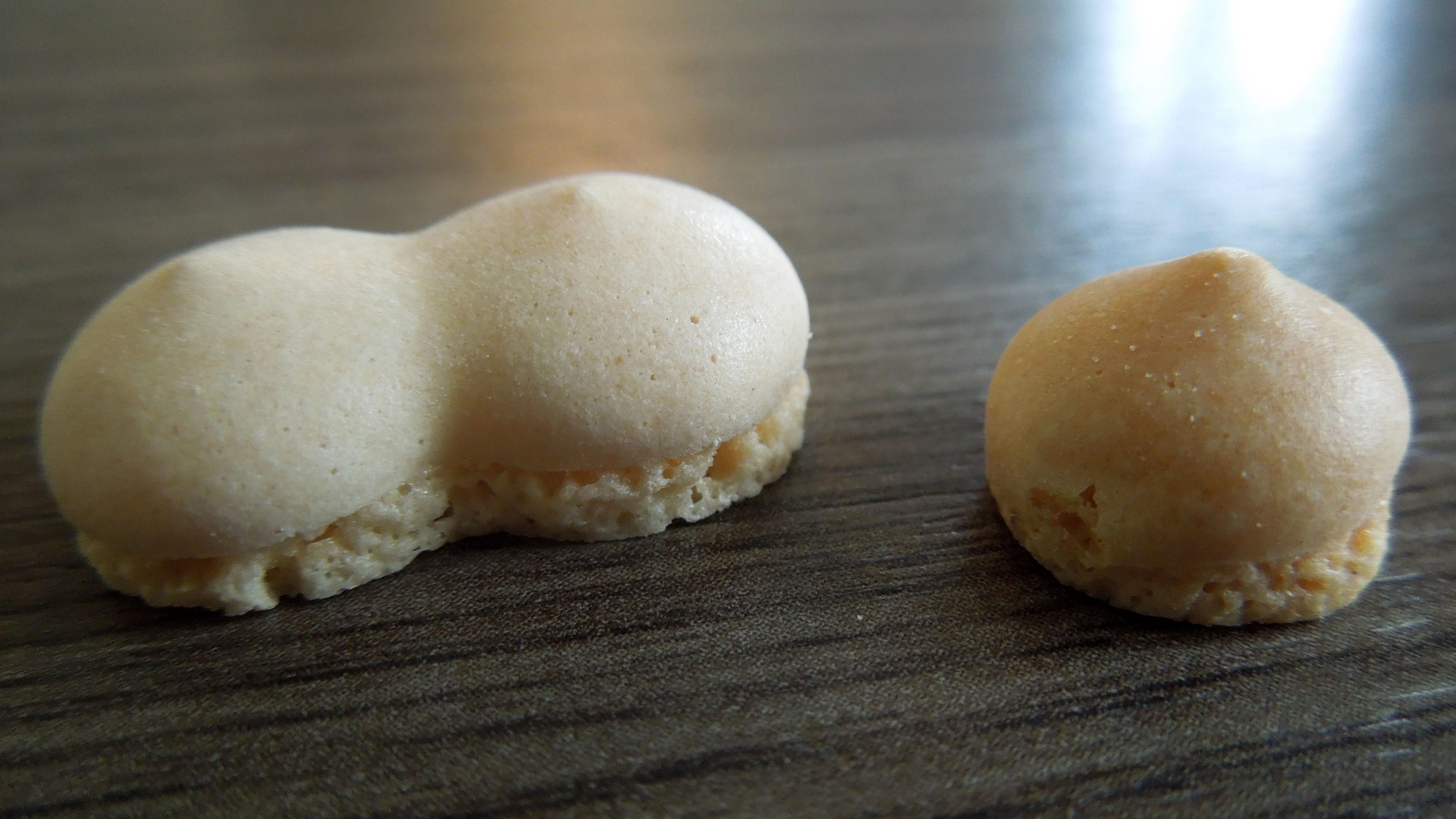 Detailaufnahme von zwei Wibele